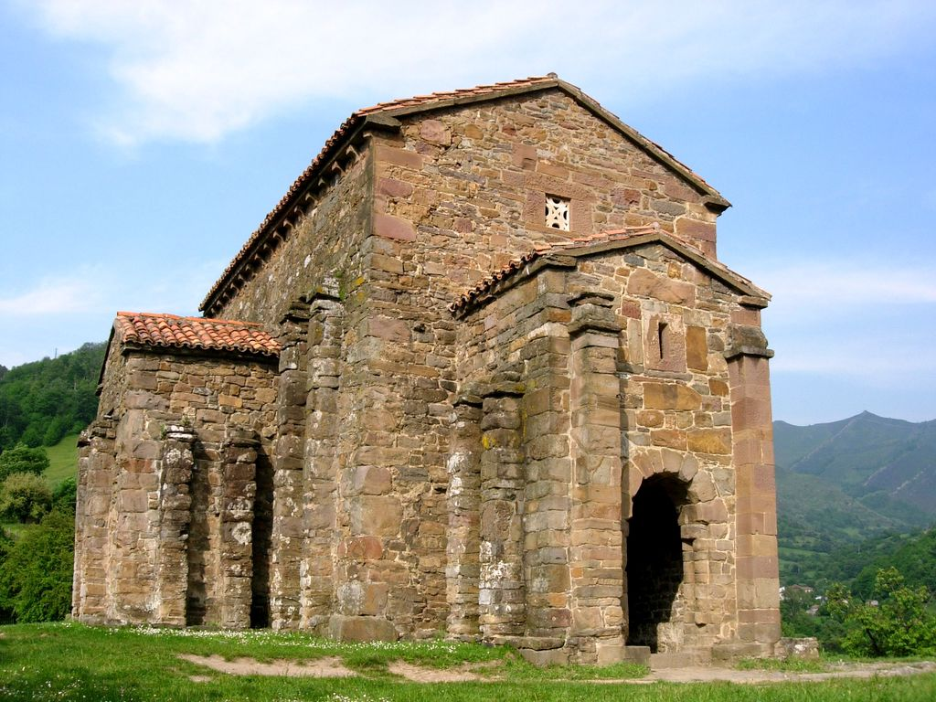 Una de la joyas del prerrománico asturiano.